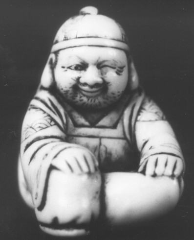 Netsuke przedstawiający Ebisu na rybie